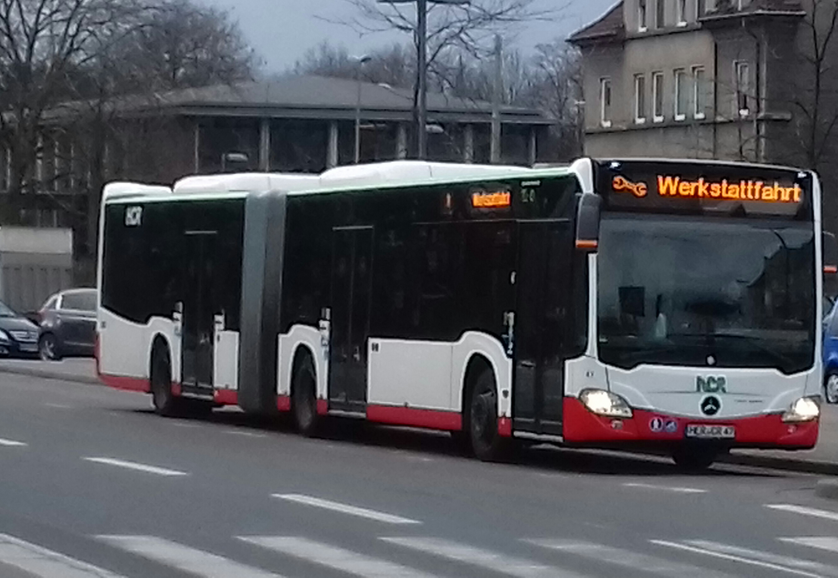 STANDARD HCR WAGEN